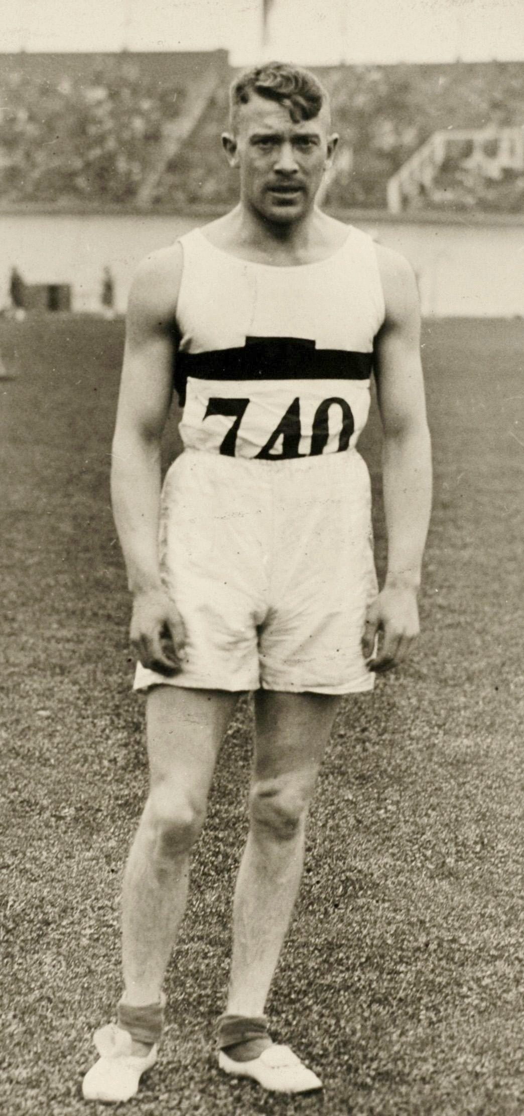 Sport. Olympische Spelen 1928 Amsterdam, Nederland : De Duitser J. Schüller, die in de finale van de 200 meter hardlopen zesde werd.